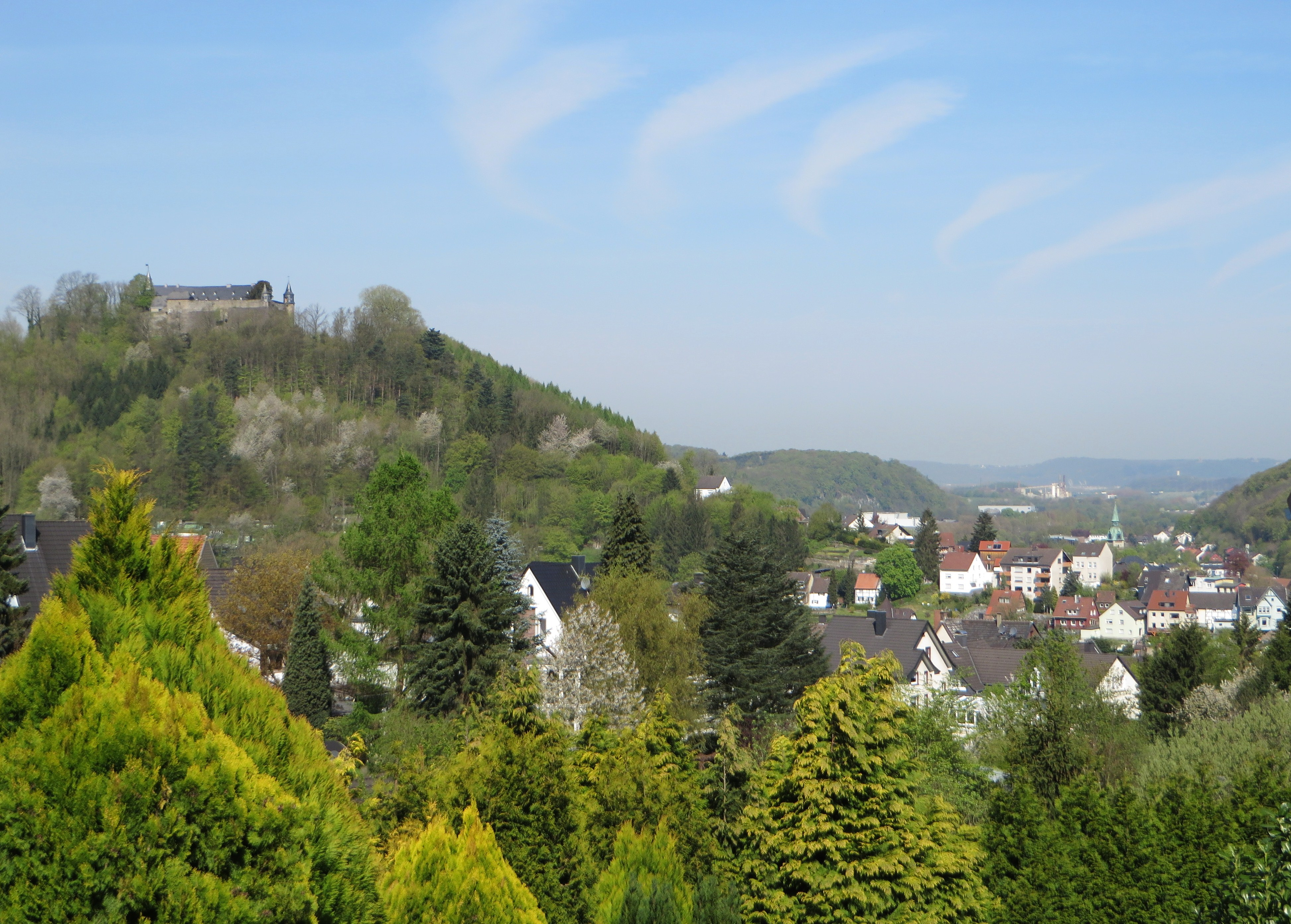 Blick vom Bergholz am Zimmerberg auf Schloss Hohenlimburg und den Hagener Stadtteil Hohenlimburg. Das Schloss, die einzig erhaltene Höhenburg Westfalens, ist ein Hagener Bodendenkmal und liegt im Landschaftsschutzgebiet Stoppelberg.